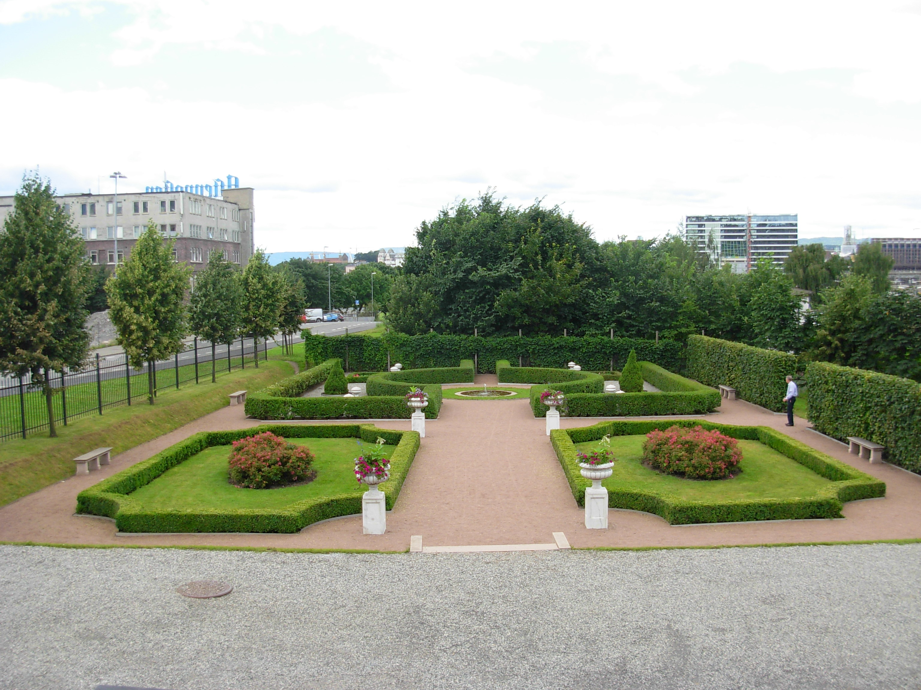 Oslo Ladegård, barokkhagen